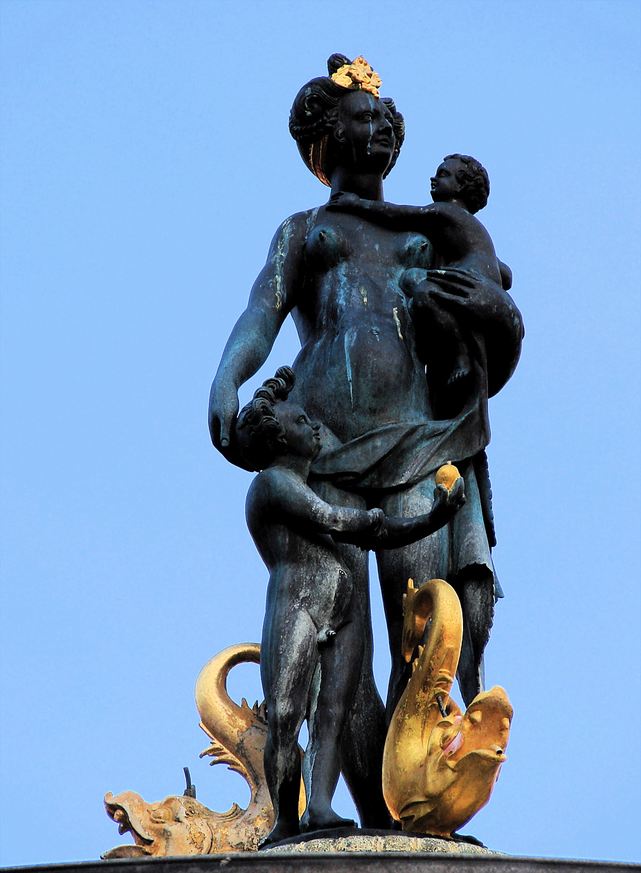 Detalje fra Caritasbrønden af Statius Otto, Gammeltorv, København